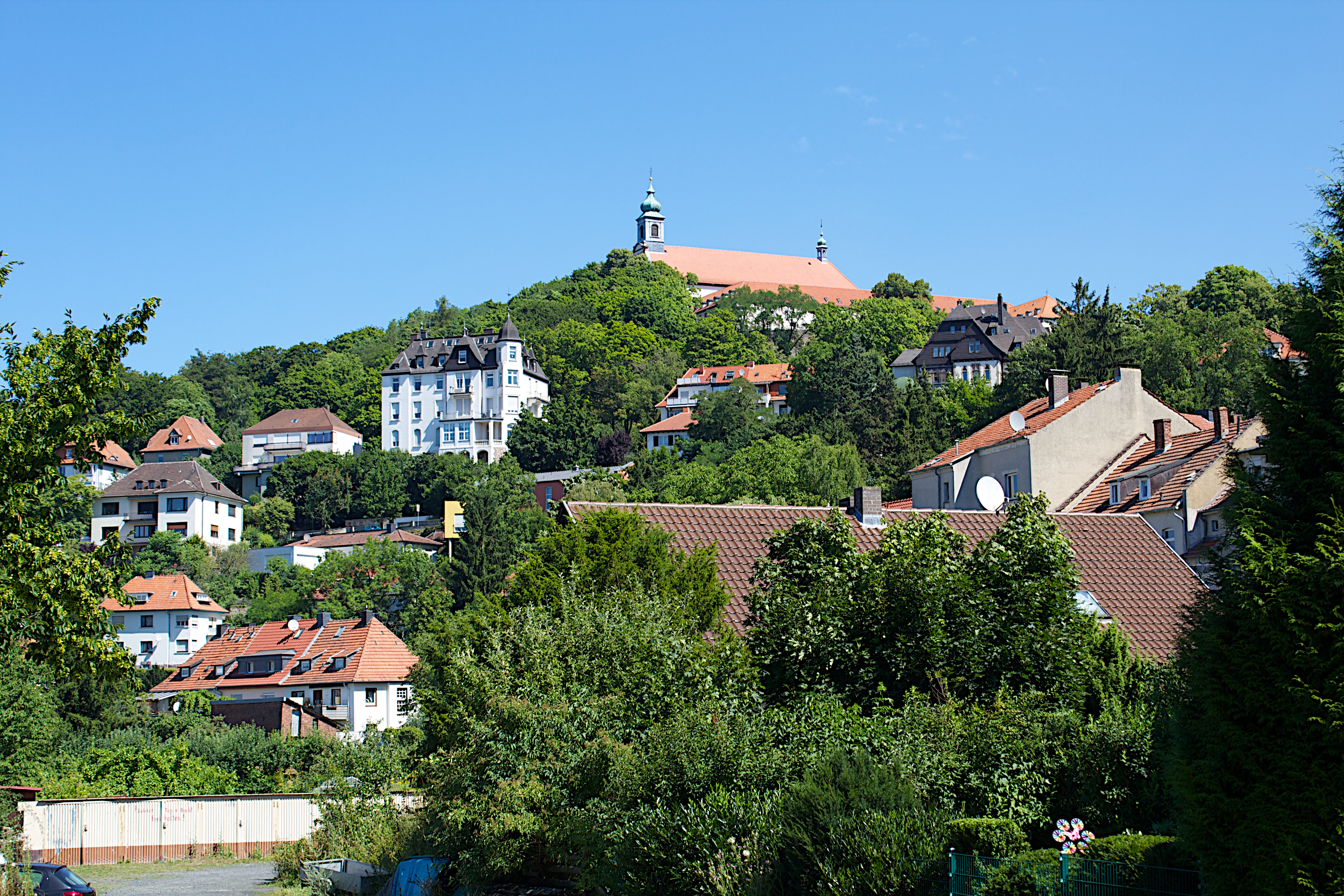 Fulda